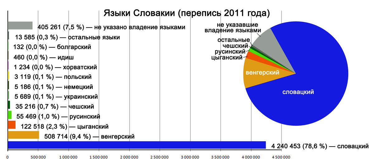 Языки Словакии согласно данным переписи населения в Словацкой Республике за 2011 год: Štatistický úrad Slovenskej republiky; Štatistický úrad Slovenskej republiky. Statistics. Demografia a sociálne štatistiky. Sčítanie obyvateľov, domov a bytov. Sčítanie obyvateľov, domov a bytov 2011. Základné výsledky. Slovenská republika; Štatistický úrad Slovenskej republiky. Statistics. Demografia a sociálne štatistiky. Sčítanie obyvateľov, domov a bytov. Sčítanie obyvateľov, domov a bytov 2011. Základné výsledky. Slovenská republika. Tab. 11. Obyvateľstvo SR podľa materinského jazyka